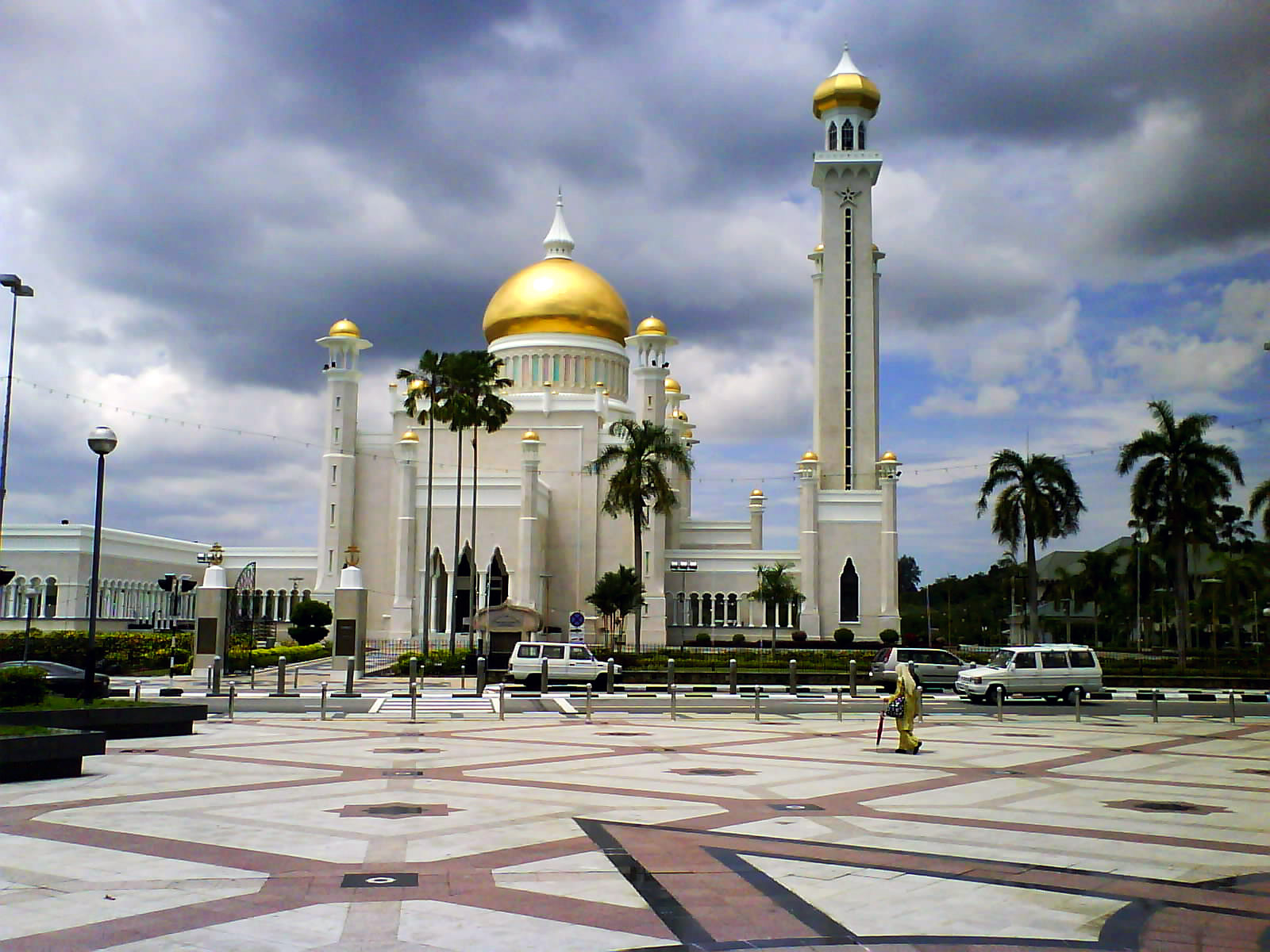 Sultan Omar Ali Saifuddin Mosque in Bandar Seri Begawan, Brunei Darussalam.